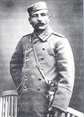 Srpski (latinica): Mašan Božović, general ; fotografija iz Balkanskog rata, 1912